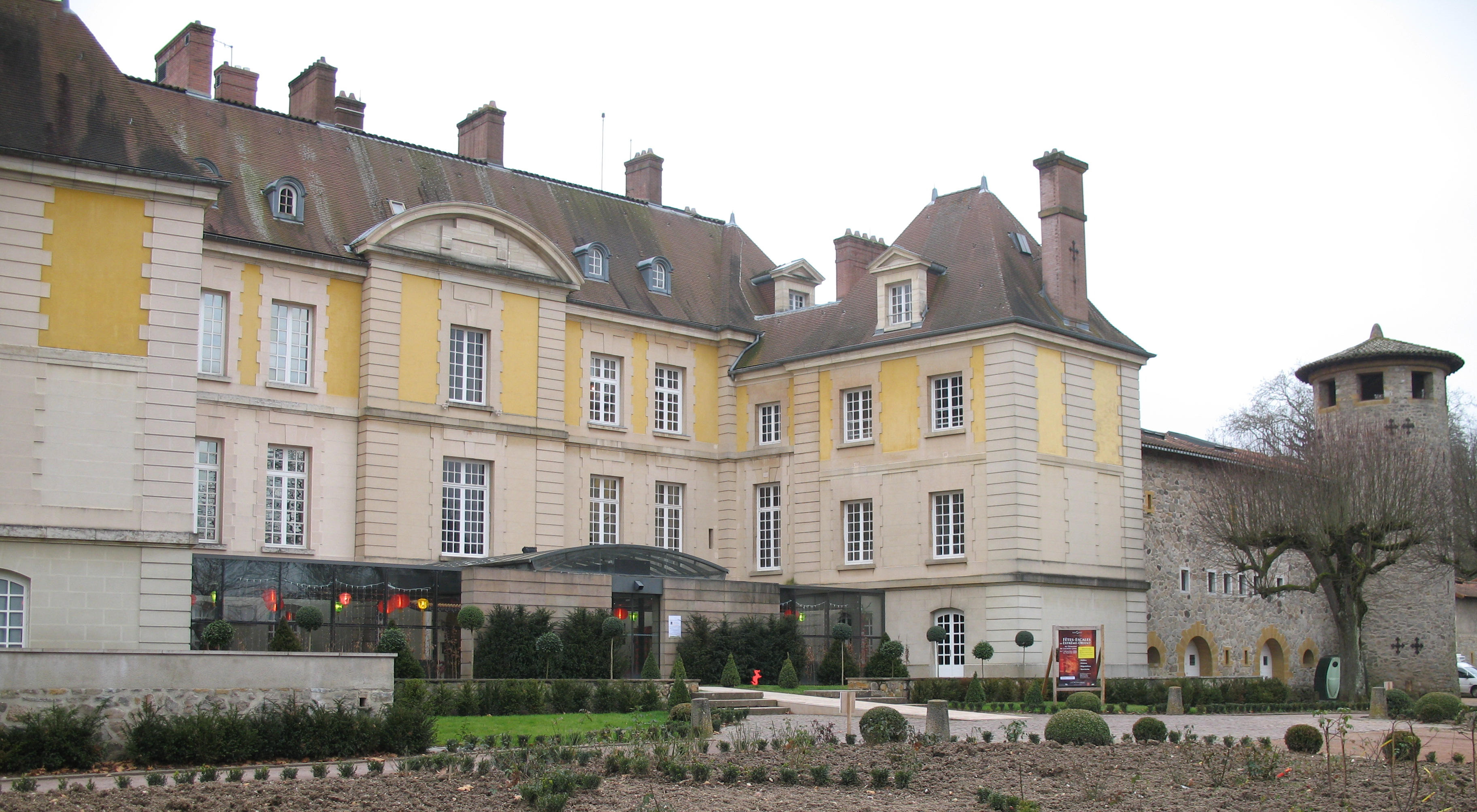 Château de Lacroix-Laval à Marcy-l'Etoile dans le Rhône